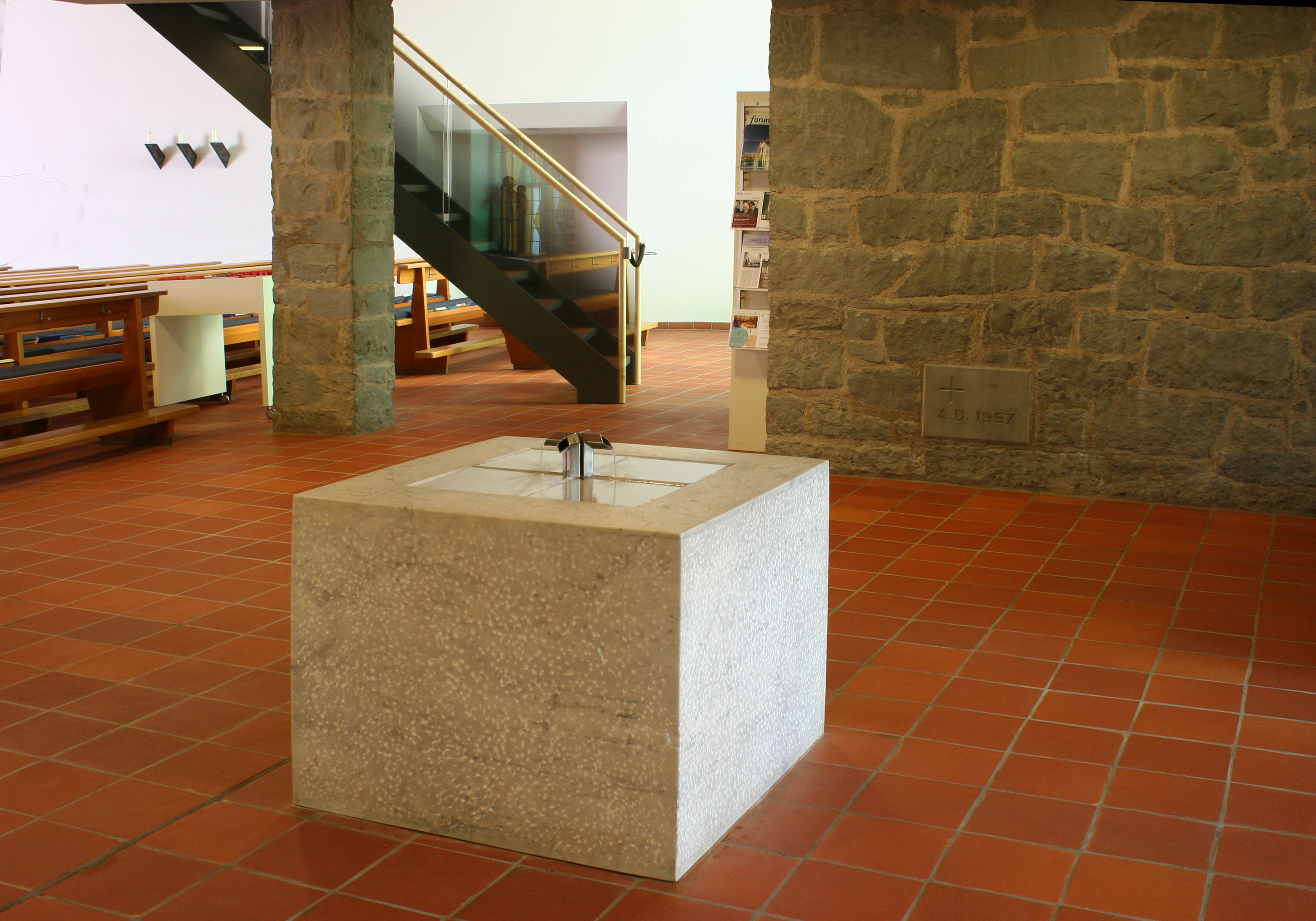 Römisch-katholische Pfarrkirche St. Antonius Wallisellen, Brunnen von Josef Caminada